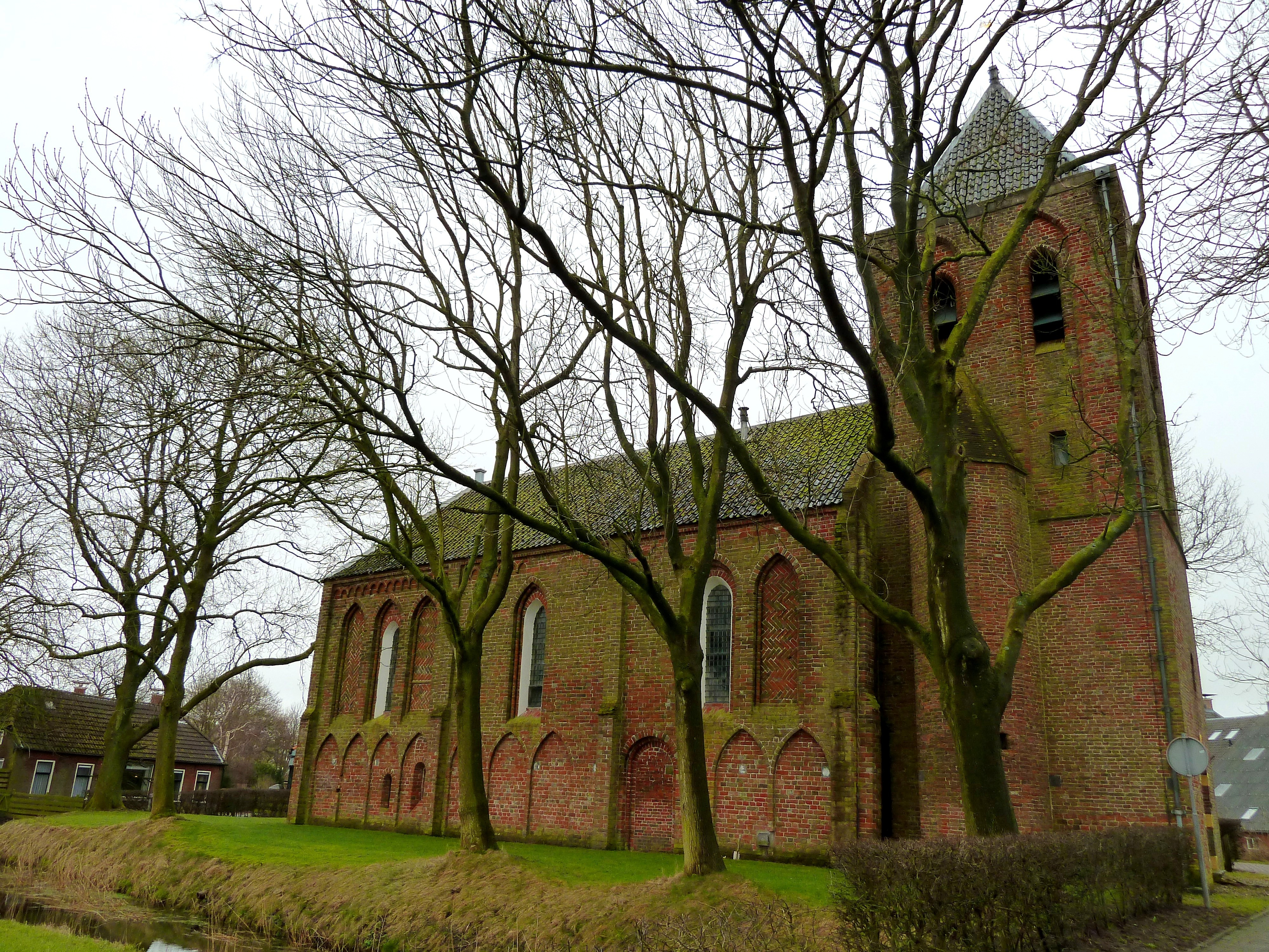 Mariakerk, zijaanzicht.